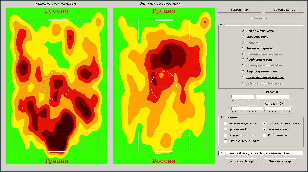 Пример теплограммы активности игроков футбольного матча компании Craftsoft